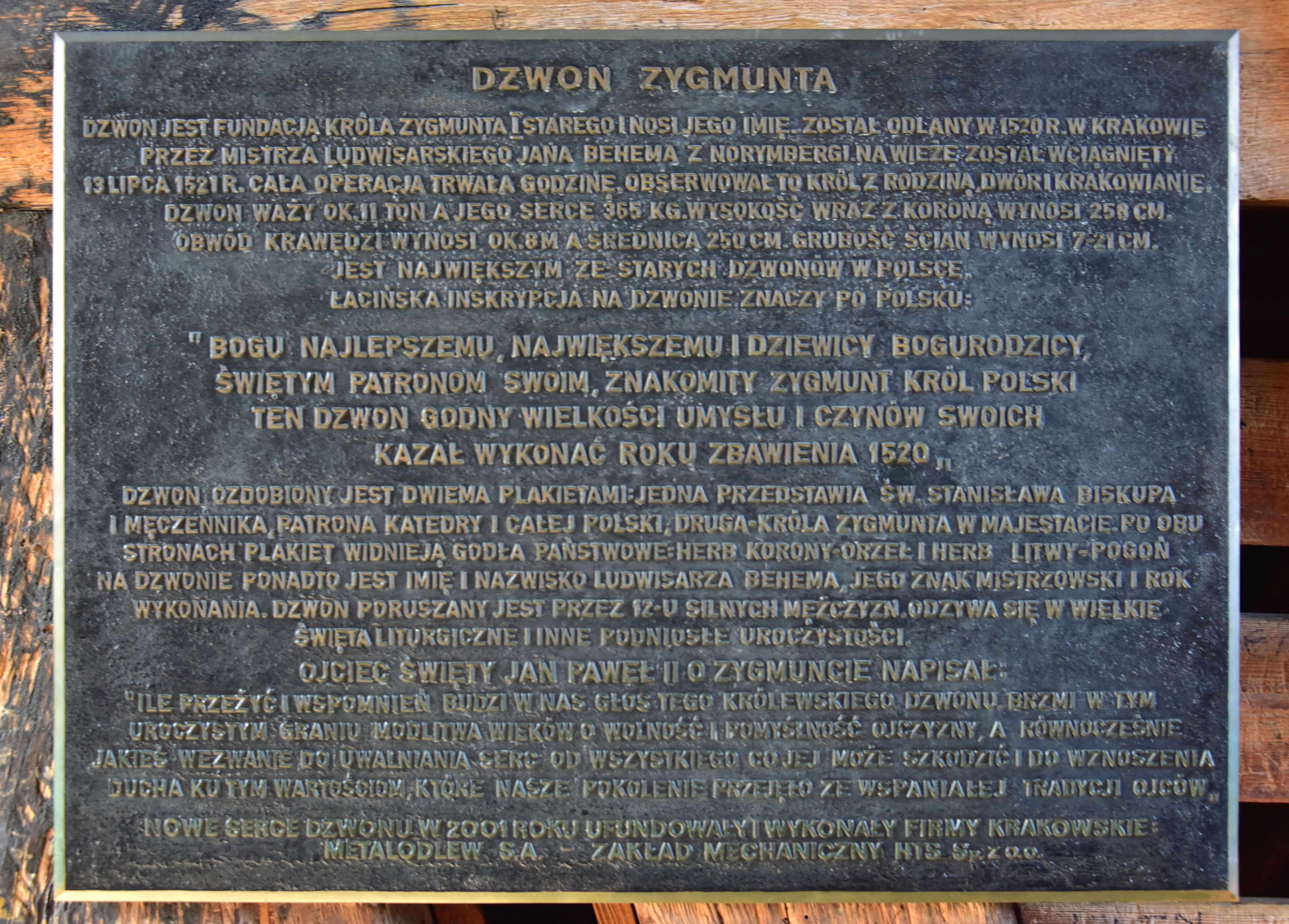 Tablica informacyjna przy Dzwonie Zygmunta w katedrze wawelskiej w Krakowie